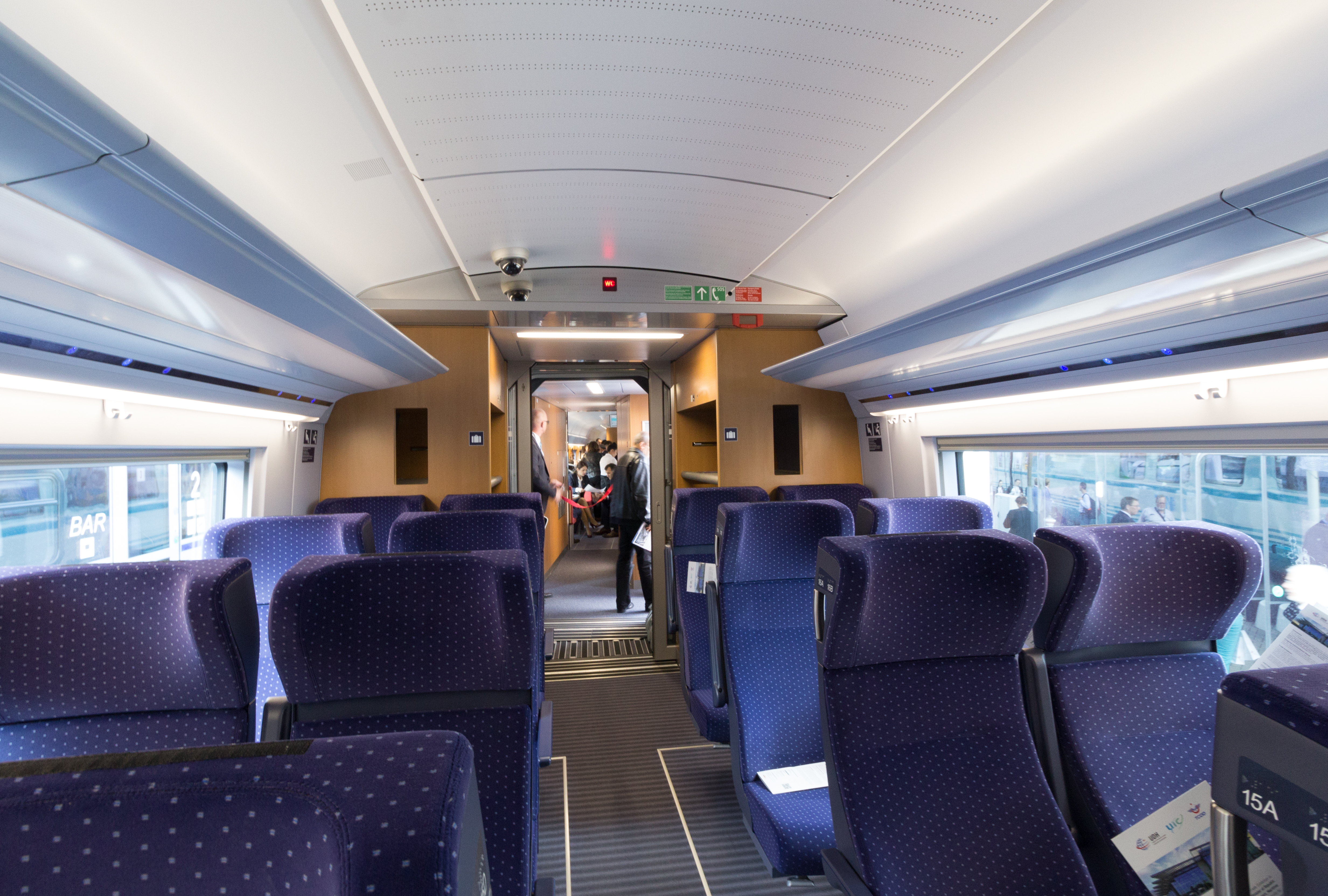 InnoTrans 2016 - TCDD HT 80000 - Siemens Velaro TR